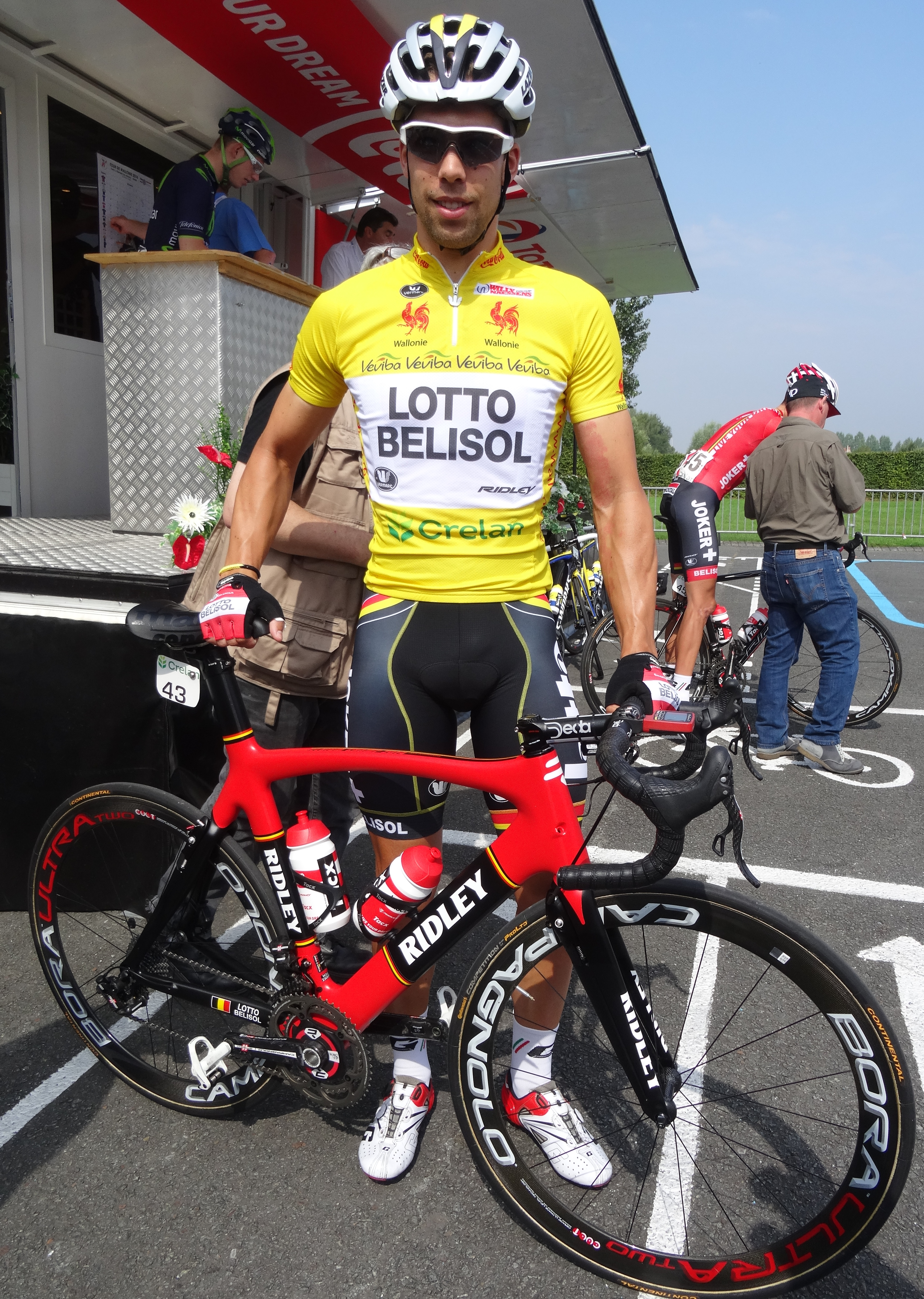 Reportage photographique réalisé le dimanche 27 juillet à l'occasion du départ de la deuxième étape du Tour de Wallonie 2014 à Péronnes-lez-Antoing (Antoing), Belgique.